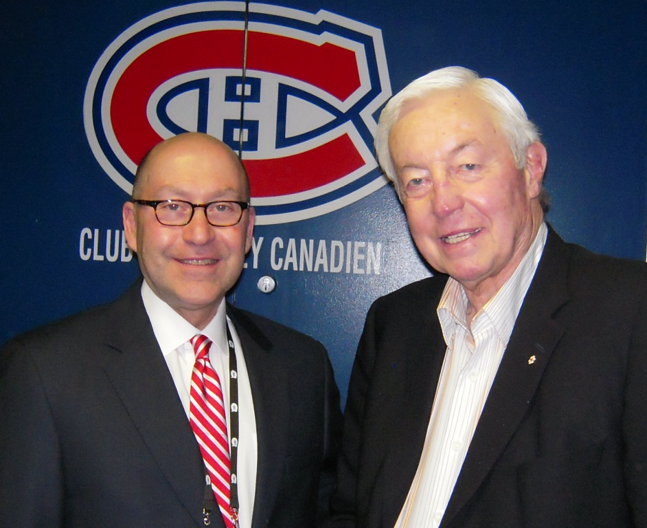 14 December 09 Ambassador David Jacobson took part in the festivities at the Bell Centre this week, attending the exciting Montreal Canadiens – Buffalo Sabres game. The Ambassador enjoyed great hospitality from Habs ownership and management, and met with several journalists who cover the team including longtime scribe Red Fisher. The Ambassador also met several Canadiens players and their families, who were taking part in a holiday charity toy drive for underprivileged children. One standout moment of the evening: meeting Habs legend Jean Béliveau. 14 décembre 09 L’Ambassadeur Jacobson se joint à la foule enthousiaste à un match des Canadiens L’Ambassadeur David Jacobson a prit part aux festivités au Centre Bell Centre cette semaine lors de l’excitant match entre les Canadiens de Montréal et les Sabres de Buffalo. Les dirigeants de la Sainte Flanelle lui ont réservé un accueil chaleureux et il a rencontré plusieurs journalistes qui couvrent l’équipe dont leur doyen, Red Fisher. L’Ambassadeur a également rencontré plusieurs joueurs des Canadiens et leurs familles qui participaient à la cueillette annuelle de jouets pour les enfants défavorisés. Un moment inoubliable de la soirée fut sans contredit la rencontre du légendaire joueur des Canadiens, Jean Béliveau.